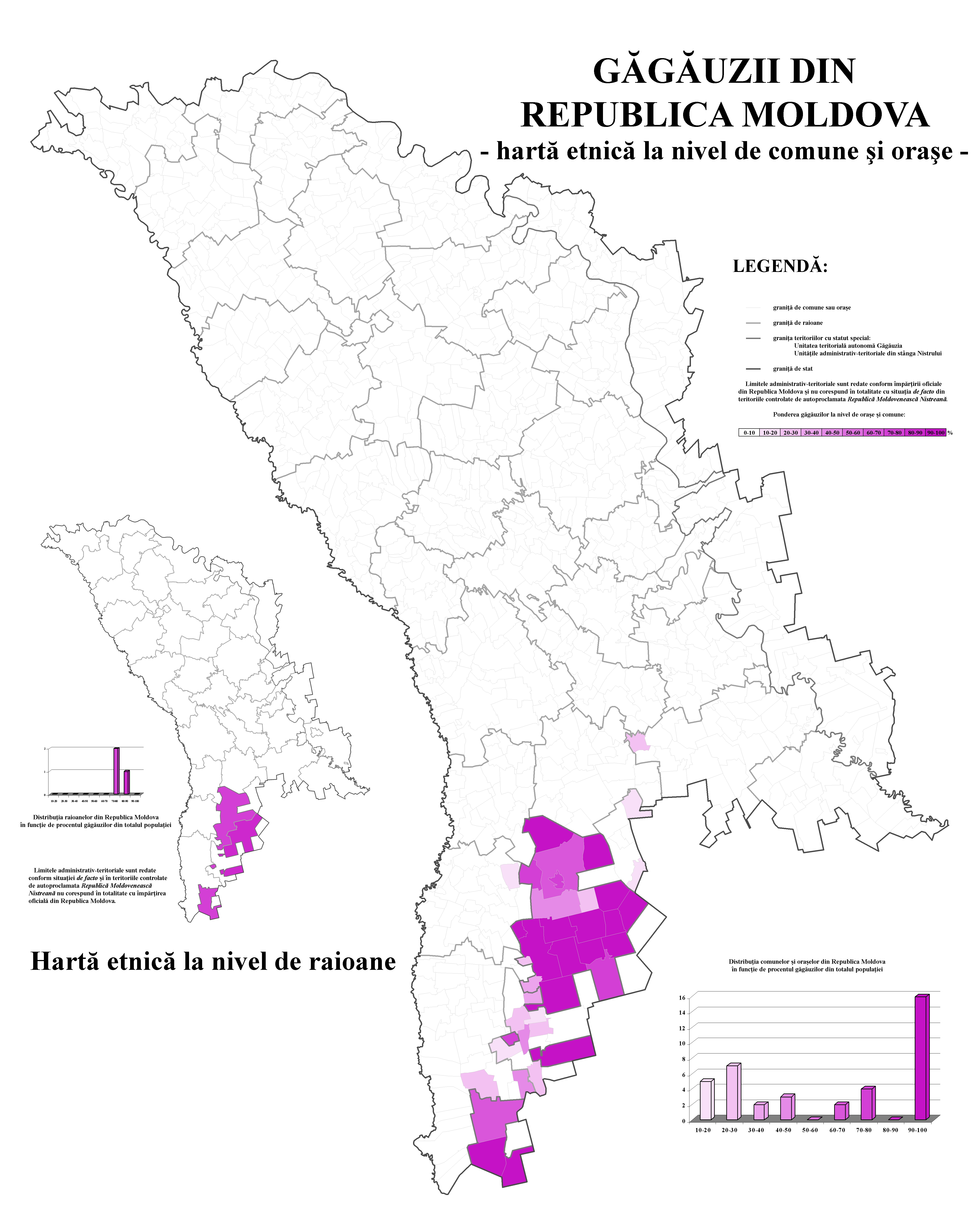 Ponderea găgăuzilor în Republica Moldova la nivel de comune conform datelor recensământului din 2004